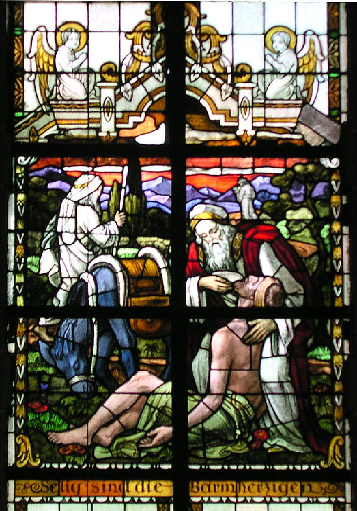 Trittenheim an der Mosel, Bleiglasfenster im Nazarenerstil (1923) in der katholischen Pfarrkirche "St. Clemens" Matthäus 5,7 Selig die Barmherzigen; denn sie werden Erbarmen finden. Aus den Jahren 1920/21 stammen die größtenteils noch originalen neoromanisch gehaltenen Glasfenster der Firmen Binsfeld-Dornoff (Trier; 3., 5., 7. und 8. Seligpreisung)